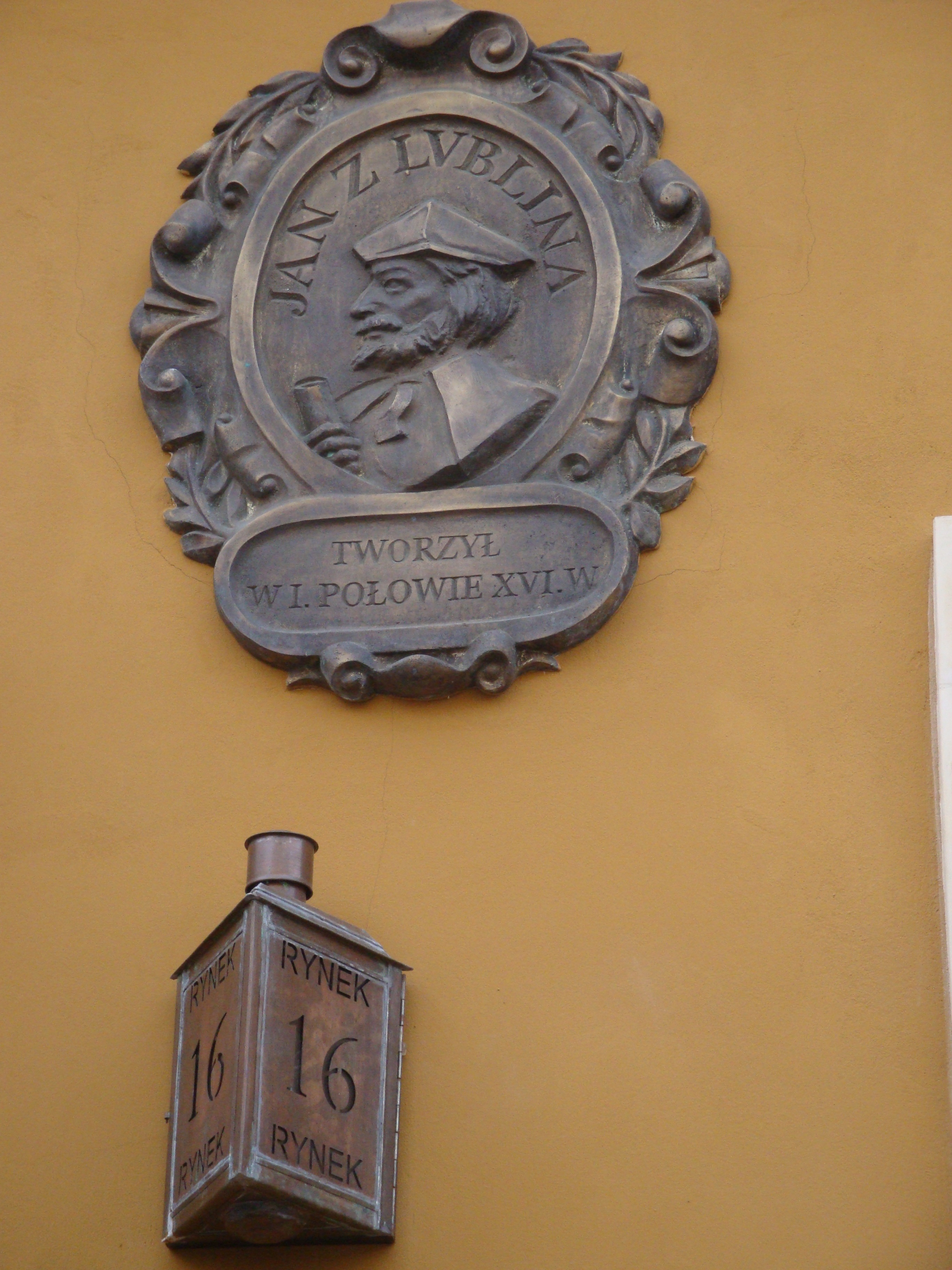 Tablica upamiętniająca Jana z Lublina na domu przy Rynku 16 w Lublinie.